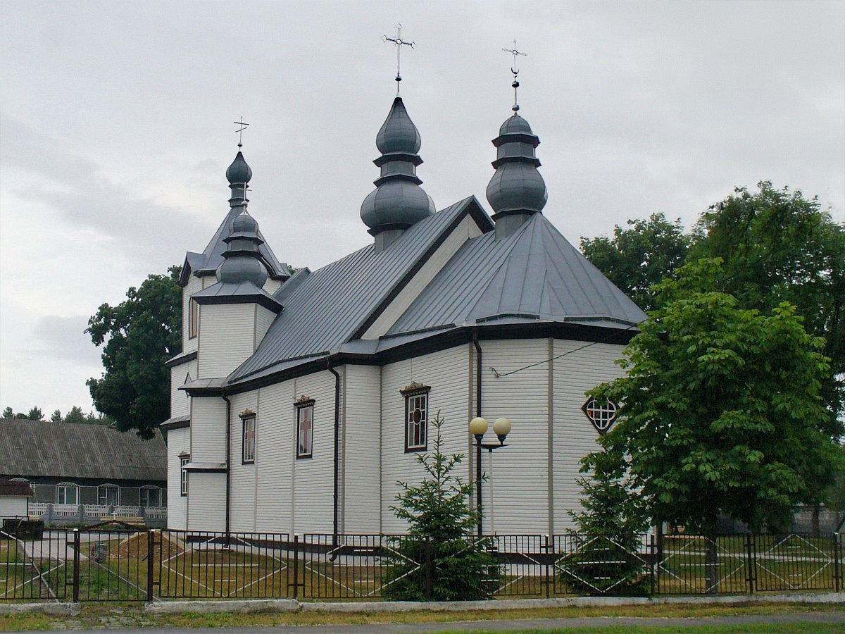 Хаціслаў. Спаса-Праабражэнская царква